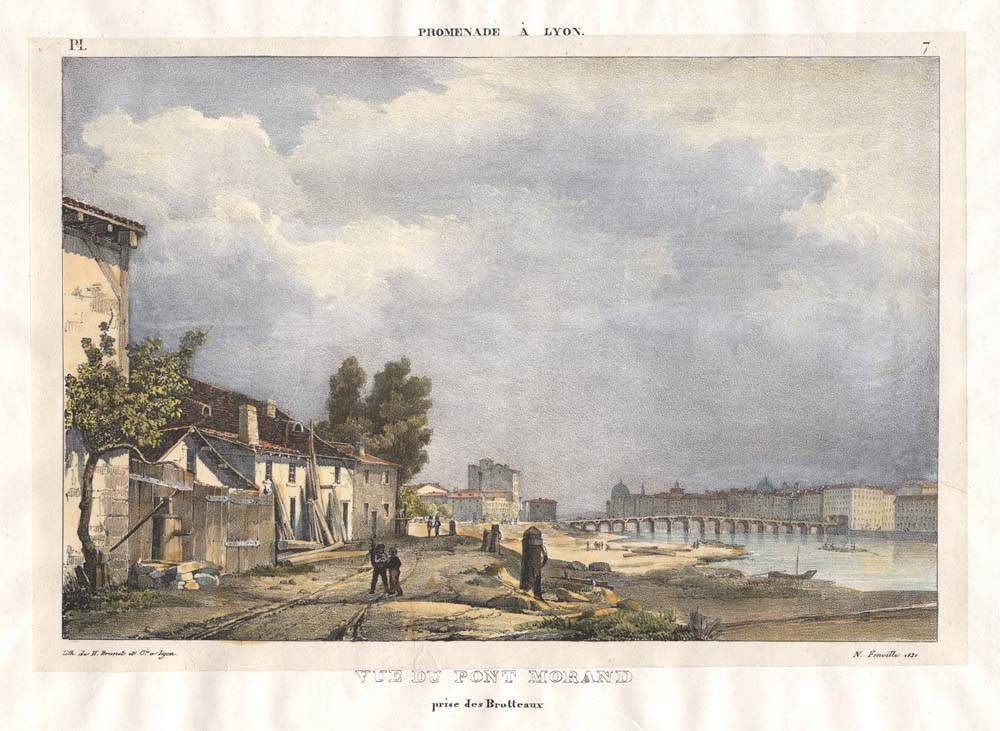 « Vue du pont Morand, prise des Brotteaux » in Promenade à Lyon, lithographie de H. Brunet à Lyon, planche 7.